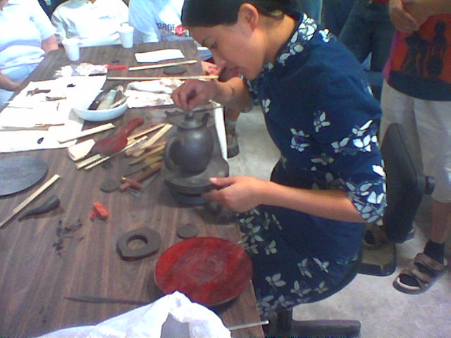 making a traditional yixing teapot